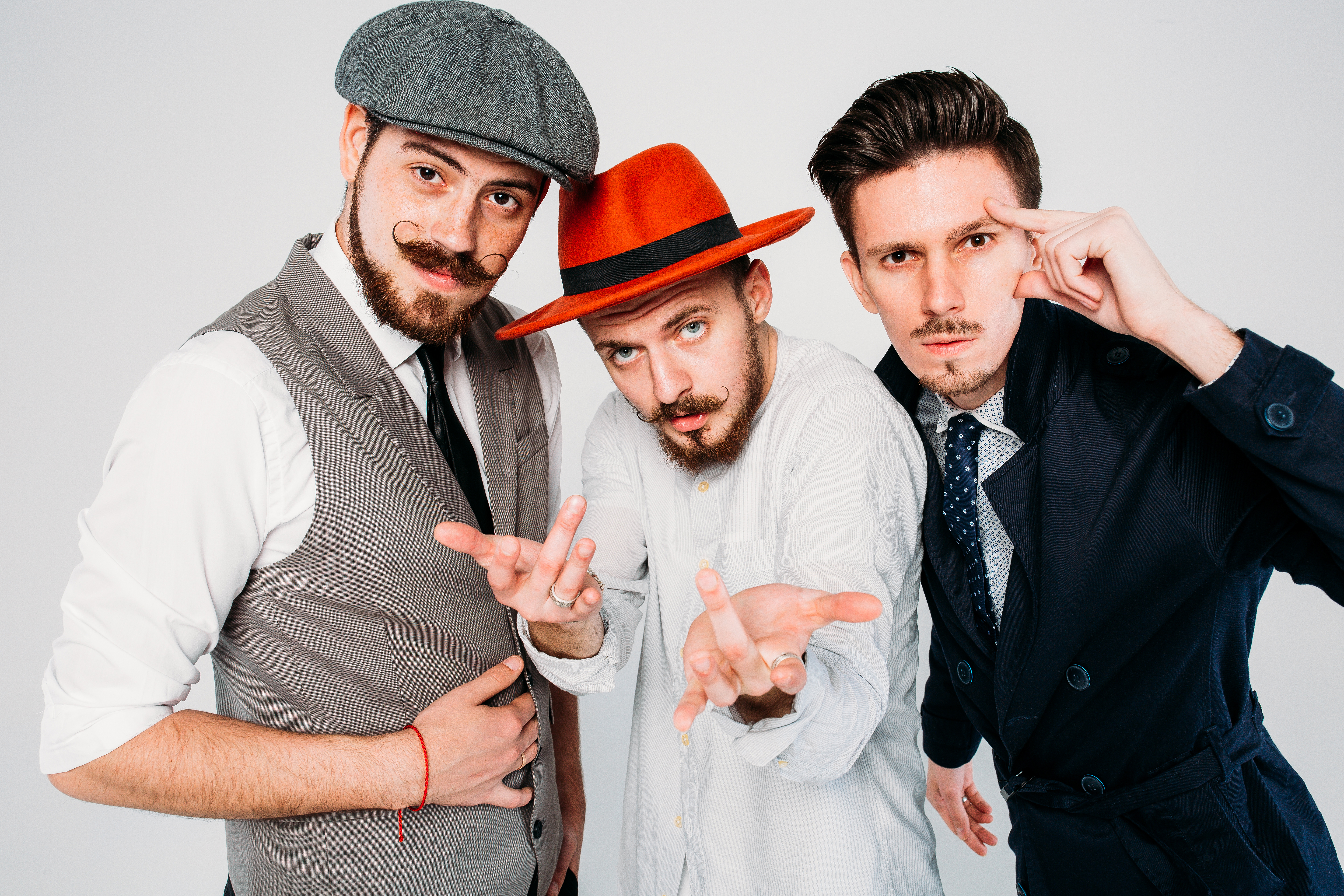 Украинская группа «Клей Угрюмого»